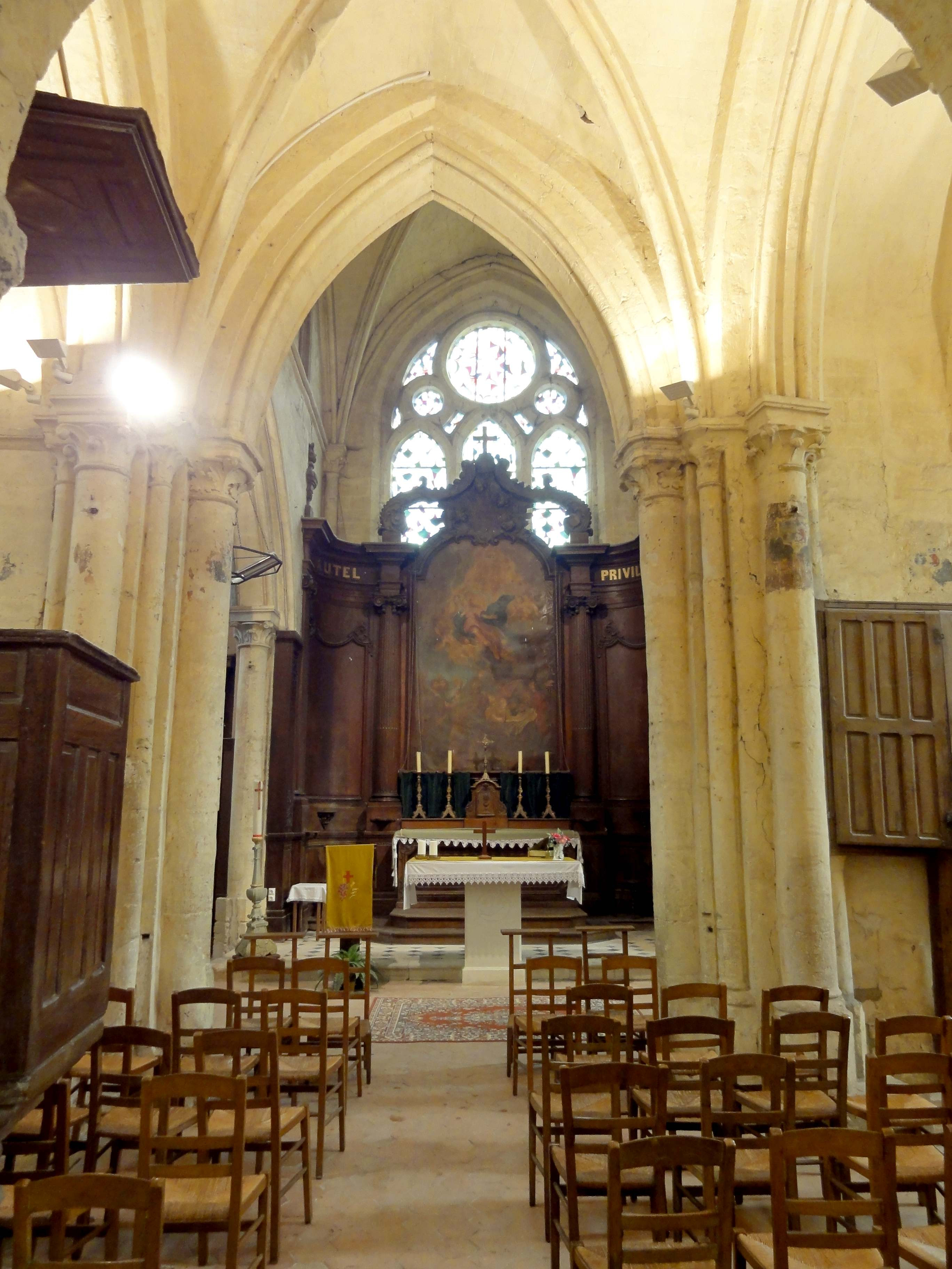 Intérieur de l'église (voir titre).